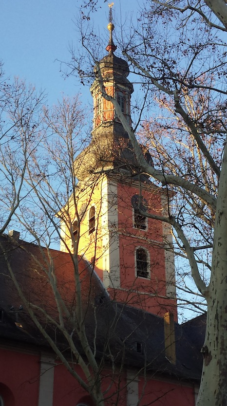 Turm der Pauluskirche Bad Kreuznach